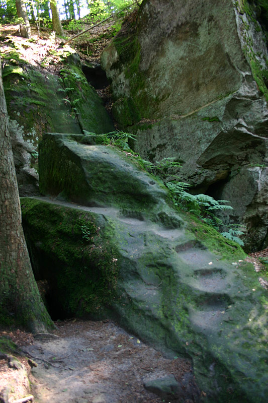 Felsstufen am hinteren Ende der Hägelesklinge bei Cronhütte im Naturschutzgebiet „Hägeles- und Brunnenklinge“, Naturpark Schwäbisch-Fränkischer Wald